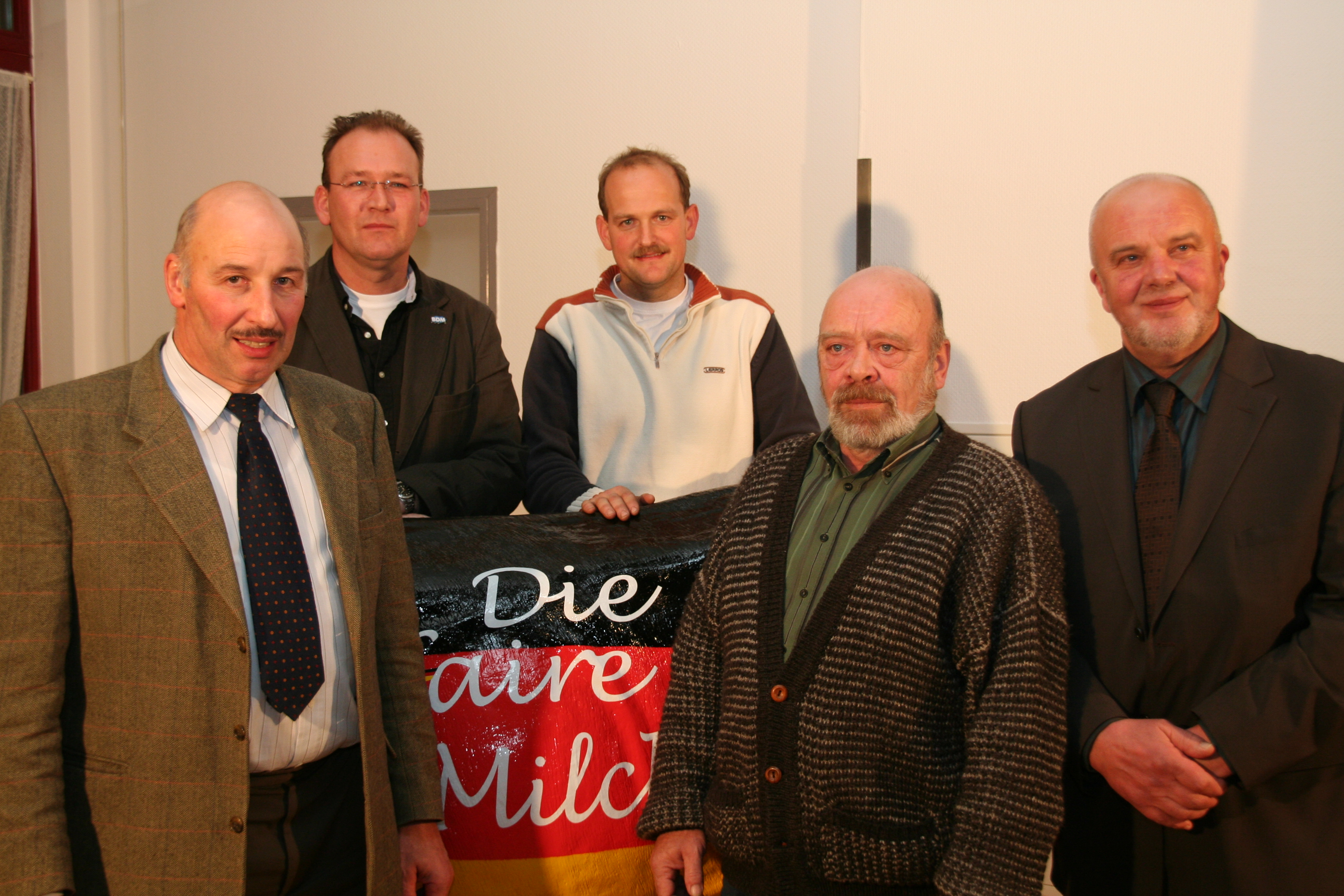 Vorstandsmitglieder des Bundesverbands deutscher Milchviehhalter (BDM)